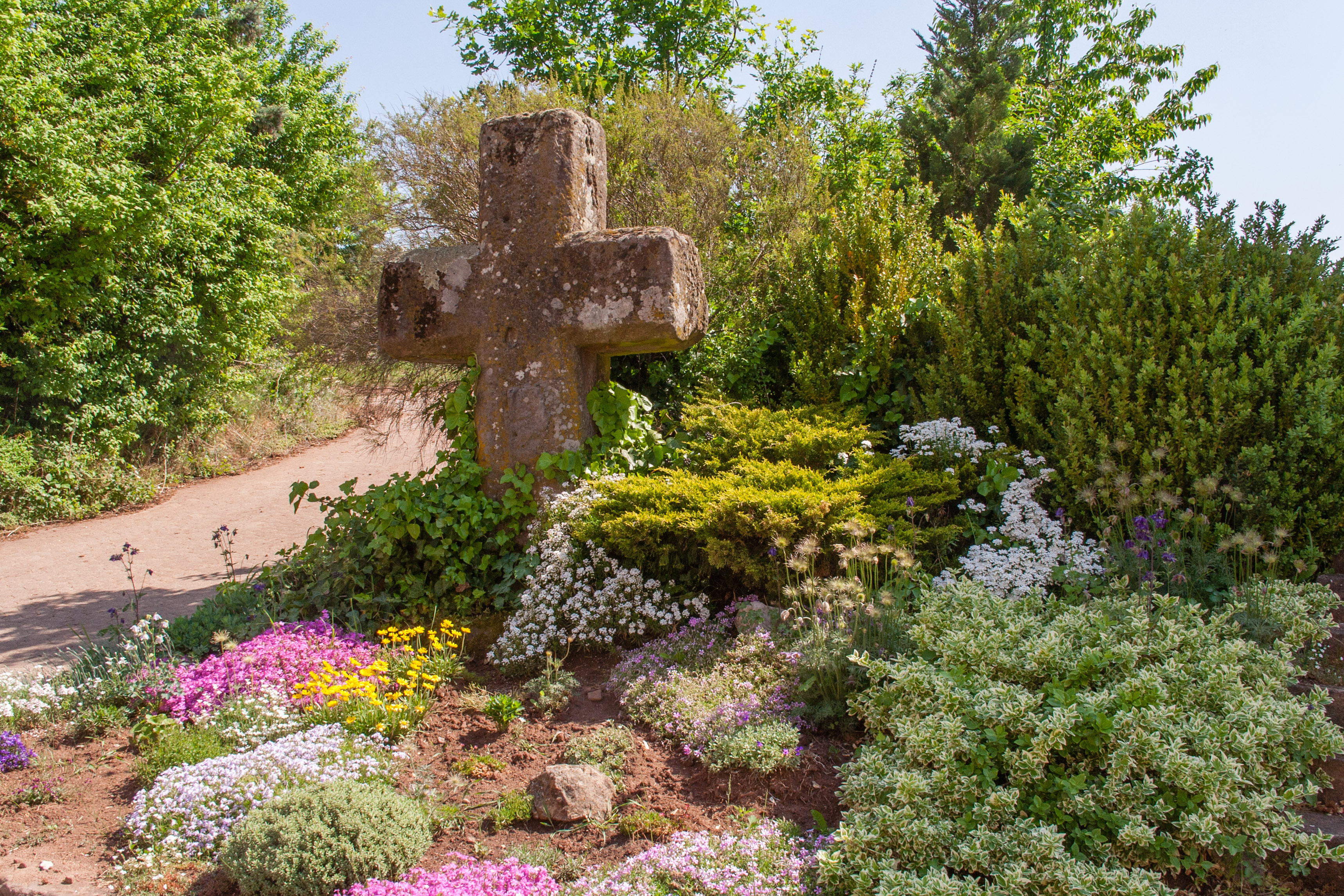 Steinkreuz, Baudenkmal, Roßtal, Neuses